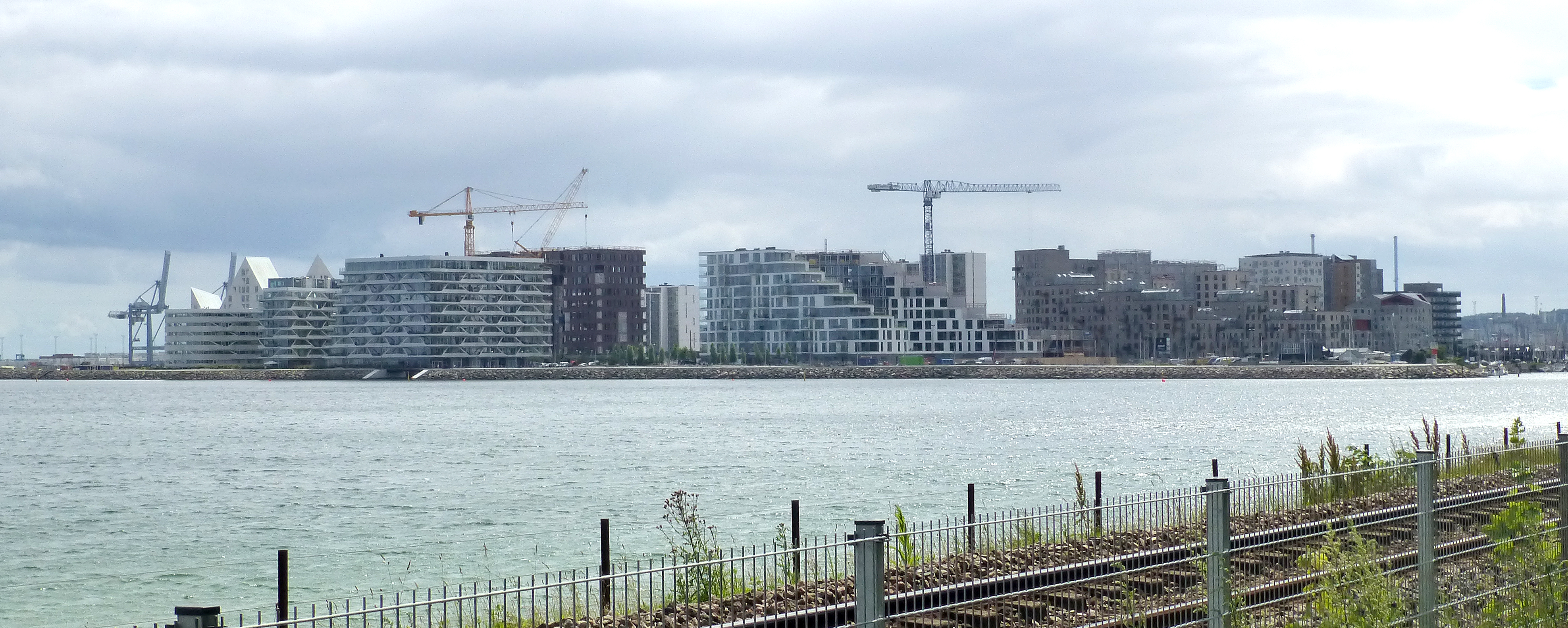 Aarhus Ø set fra nordvest juli 2016